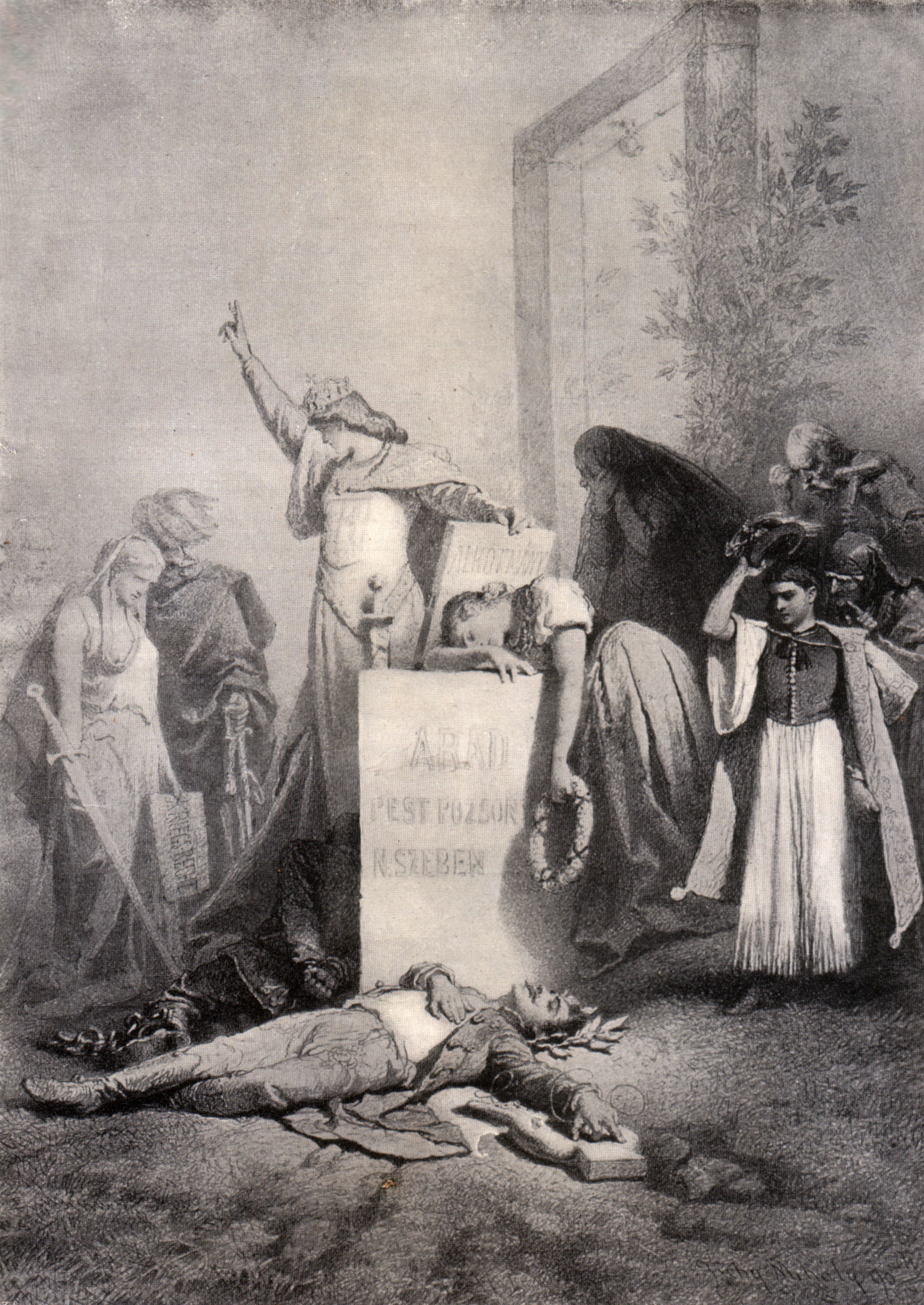 A szabadságharc elbukásának allegóriája (1849) - Zichy Mihály rajza.